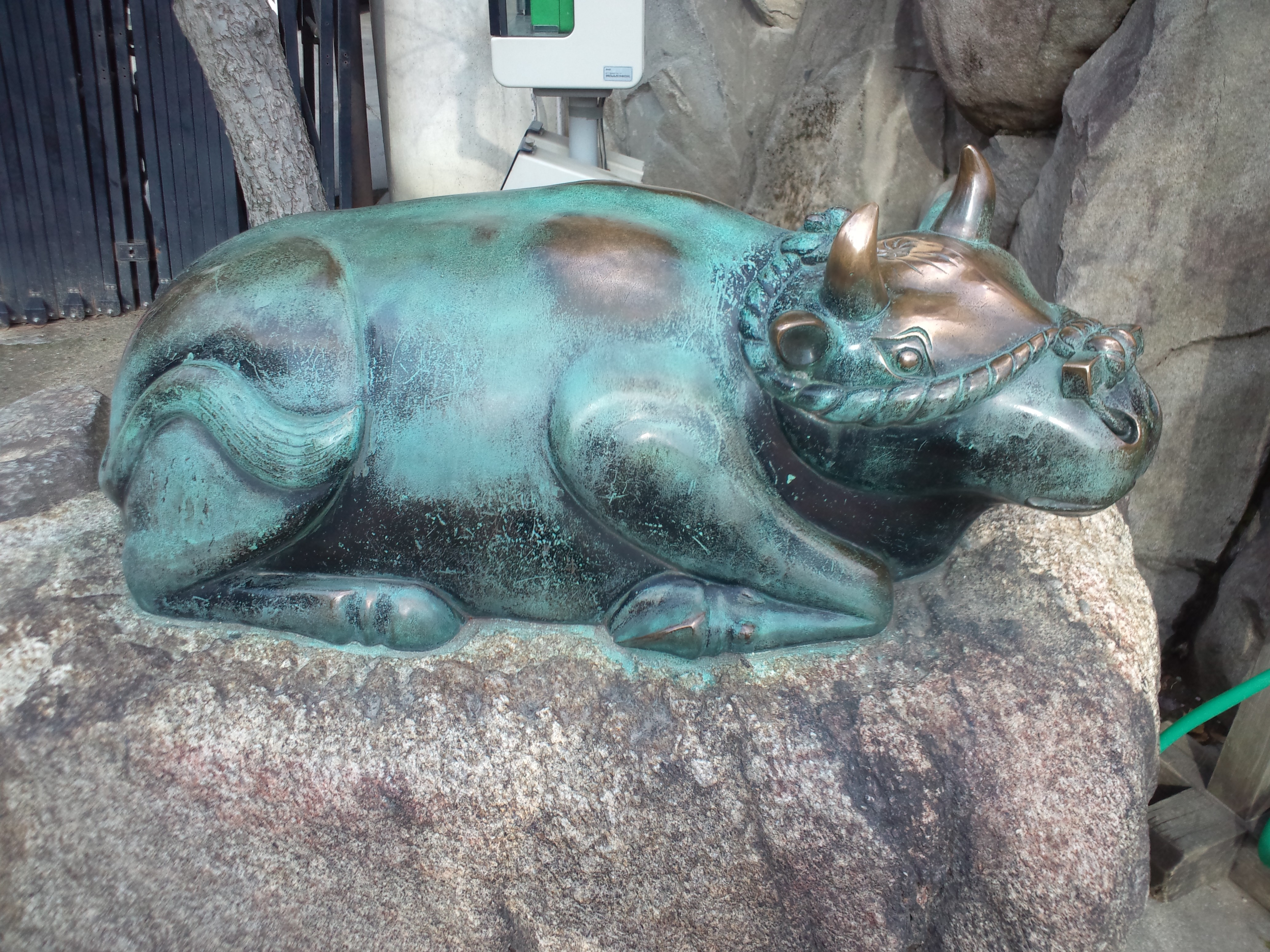 大阪天満宮 臥牛像